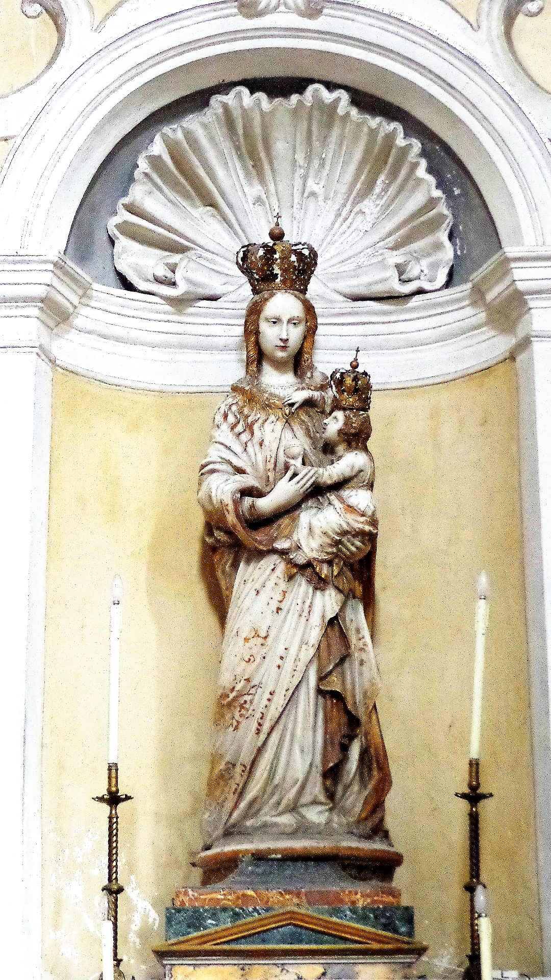 Statua raffigurante la Madonna dell'Udienza opera di Domenico Gagini.